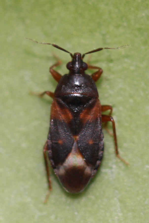 Lyctocoris dimidiatus, am 11.5.2017 vermutlich aus Kaminholz